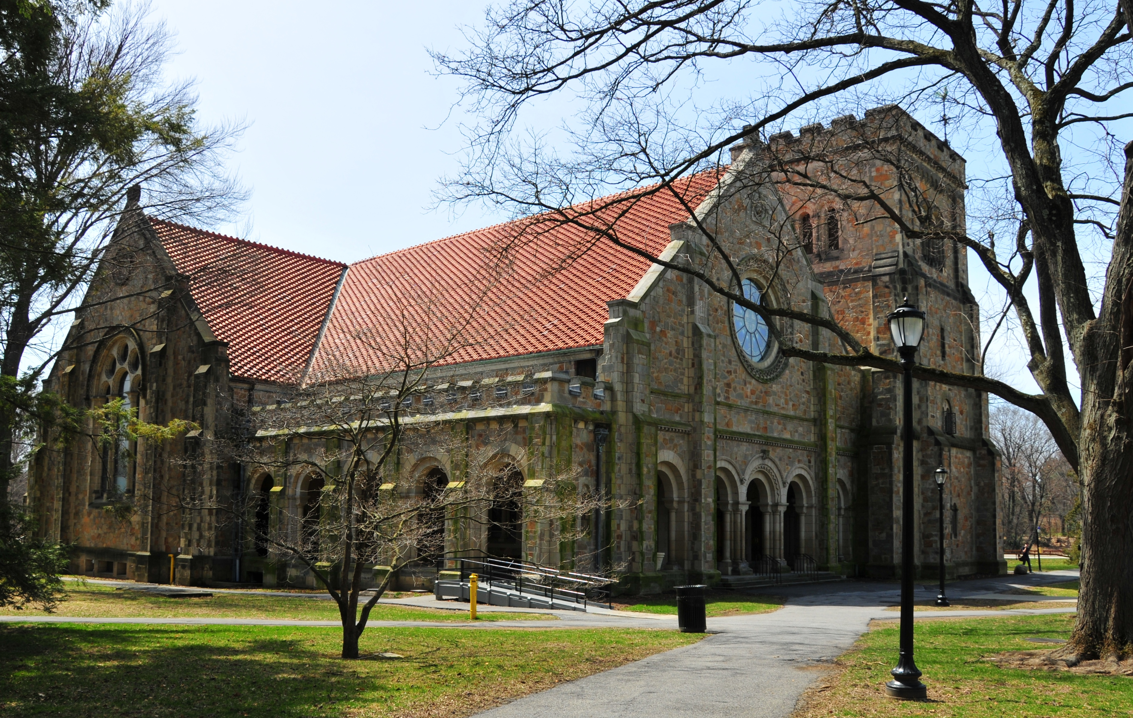 Chapel, Vassar College